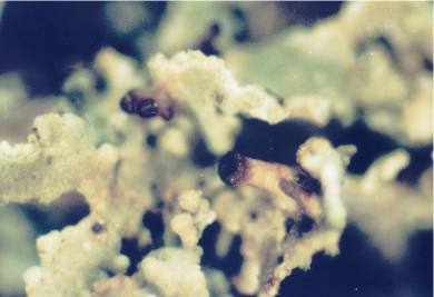 Cladonia caespiticia